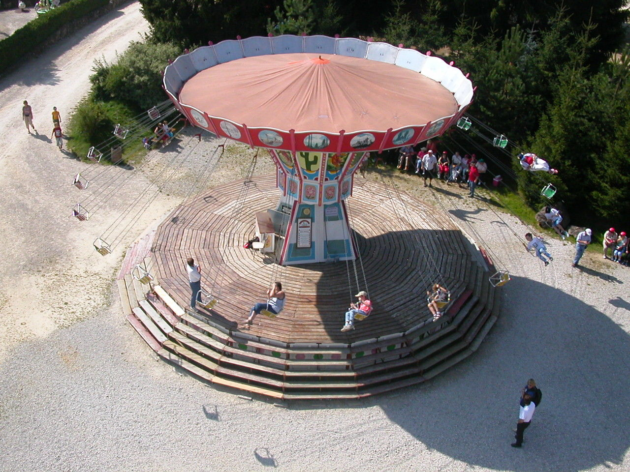 Kettenflieger im Fränkischen Wunderland